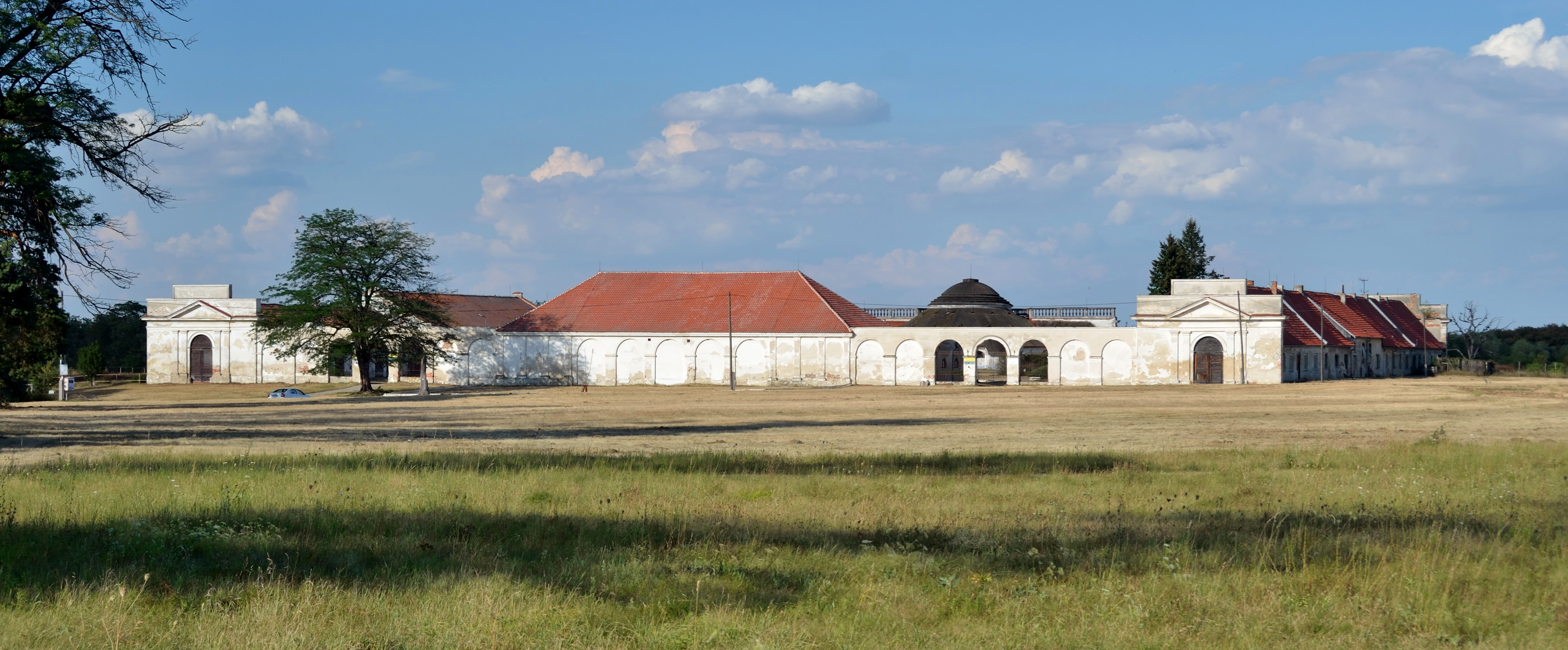 Zemědělský dvůr Nový dvůr (Charvátská Nová Ves), Charvátská Nová Ves